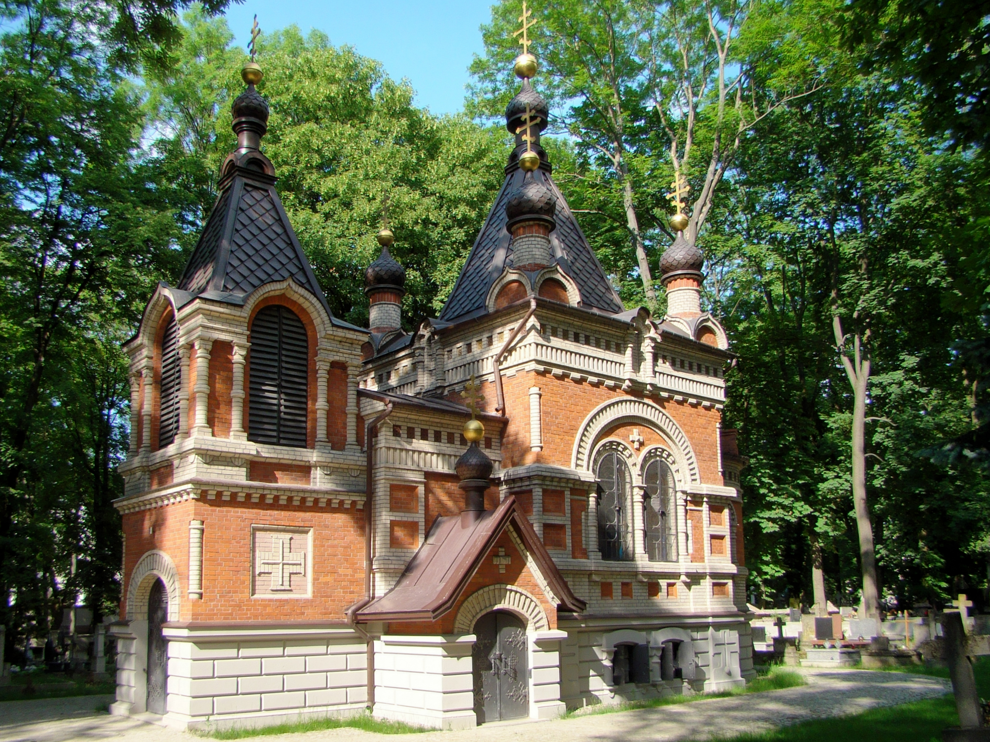 Cerkiew pw. Świętych Niewiast Niosących Wonności na cmentarzu prawosławnym przy ul. Lipowej w Lublinie.